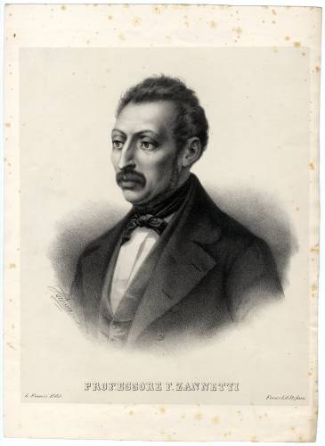 Tratta da